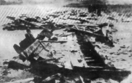 שרידיה הרופים של הספינה סלבדור לחופי העיירה סילירי בטורקיה